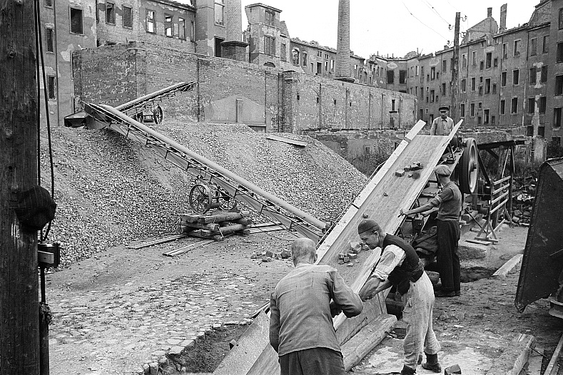 Original image description from the Deutsche Fotothek Ablagerung für eine später einsetzende Großblockproduktion